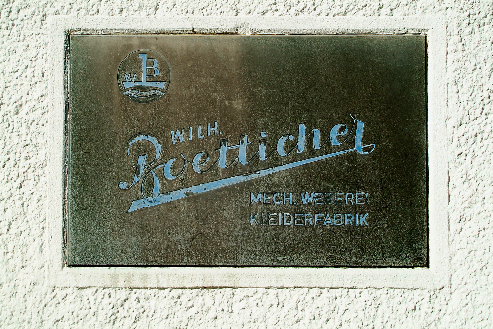 In der Fassade des Gebäudes am Weidendamm 6 in der Nordstadt von Hannover hat man das Firmenschild mit Loga der Wilhelm Boetticher, Mechanische Weberei und Kleiderfabrik sichtbar belassen ...